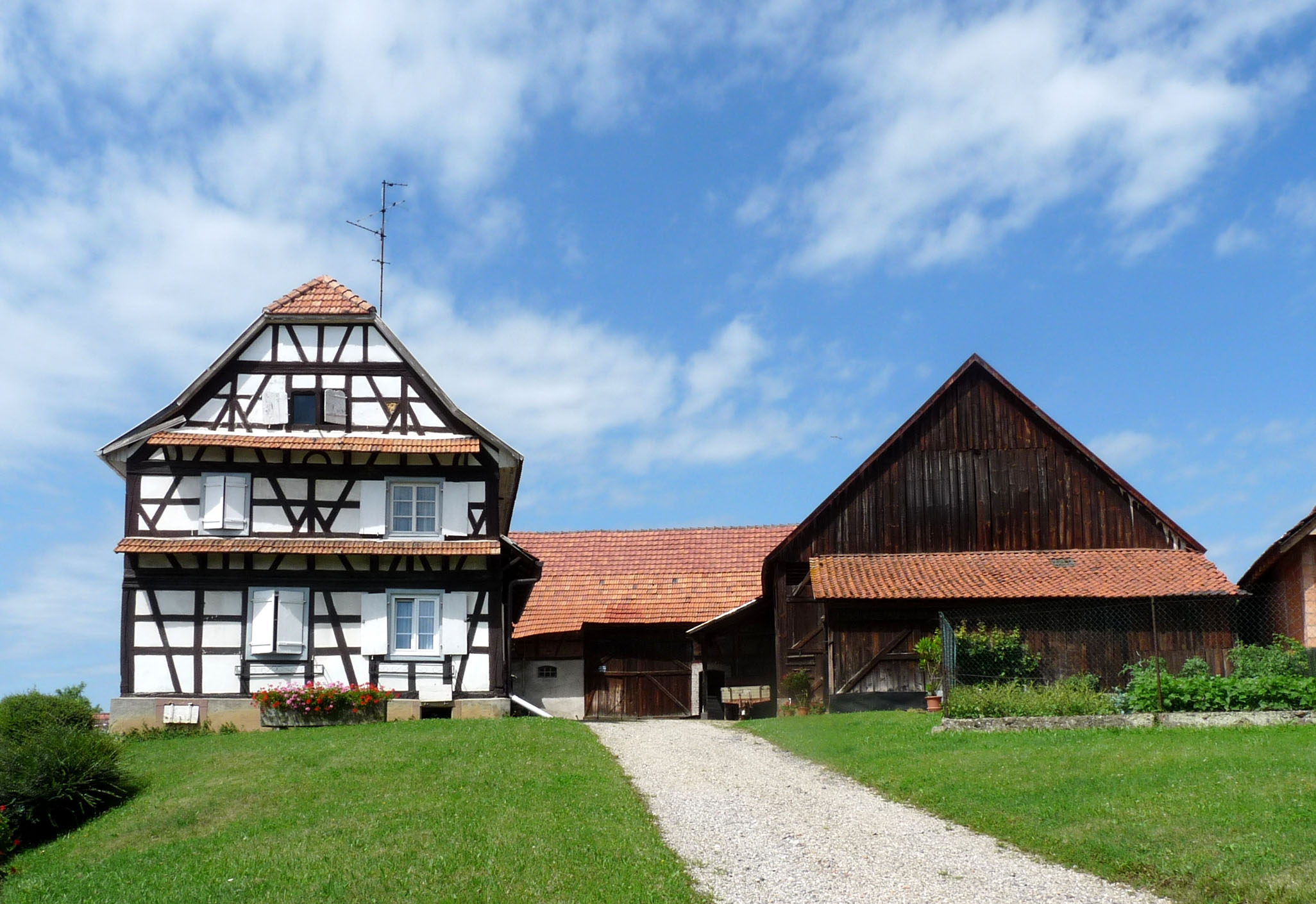 Ferme à colombages à Betschdorf (Bas-Rhin), 79 rue du Docteur Deutsch